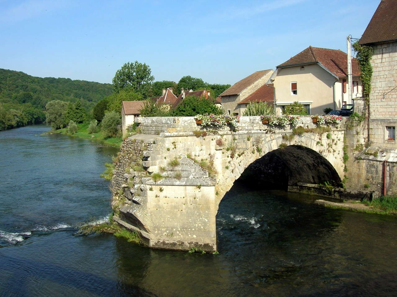 Le vieux pont, Port-Lesney, Jura, France